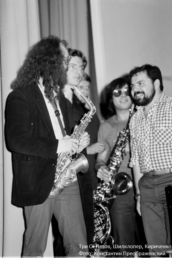 Три О (Сергей Летов (Sergey Letov), Аркадий Фимович Шилклопер, Аркадий Кириченко (Arkady Kirichenko)) в расширенном составе. (1987-88 г.)